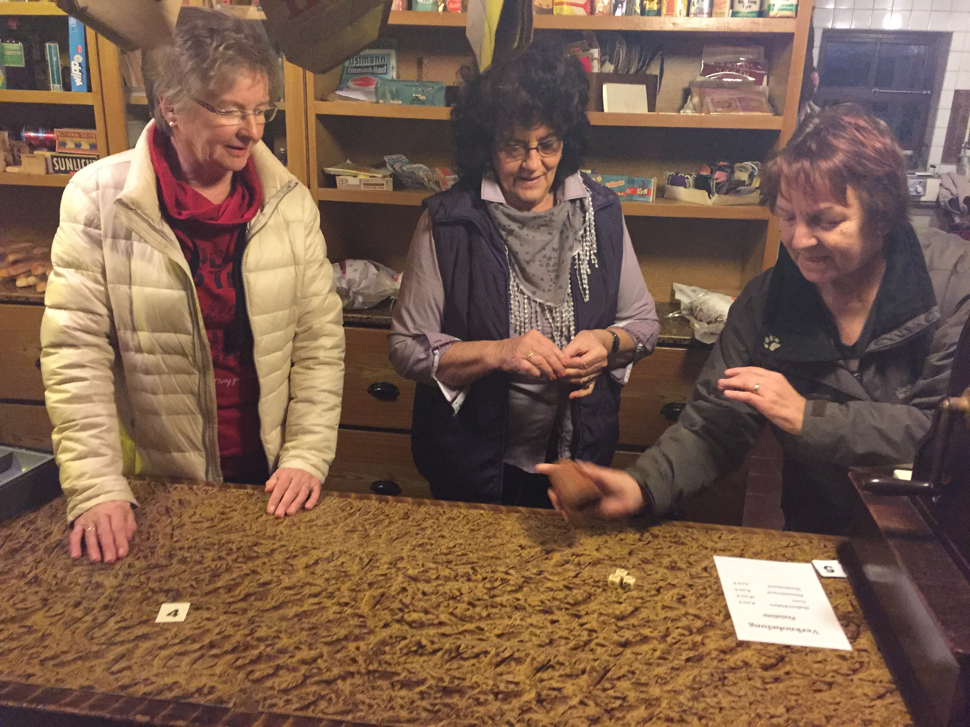 Knobeln in Ostfriesland